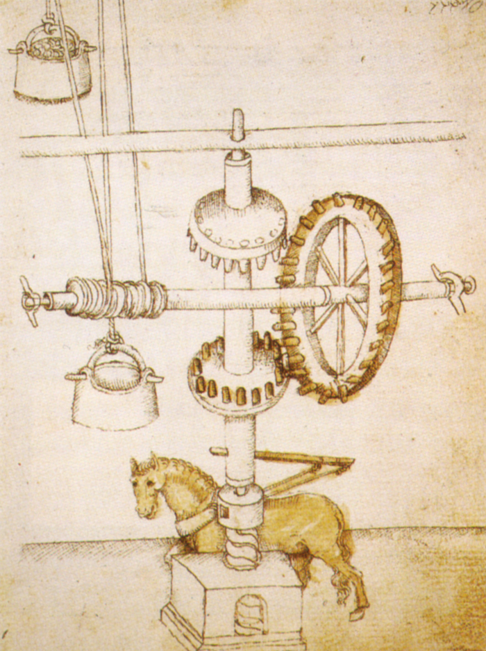 eduta generale della gru di Brunelleschi